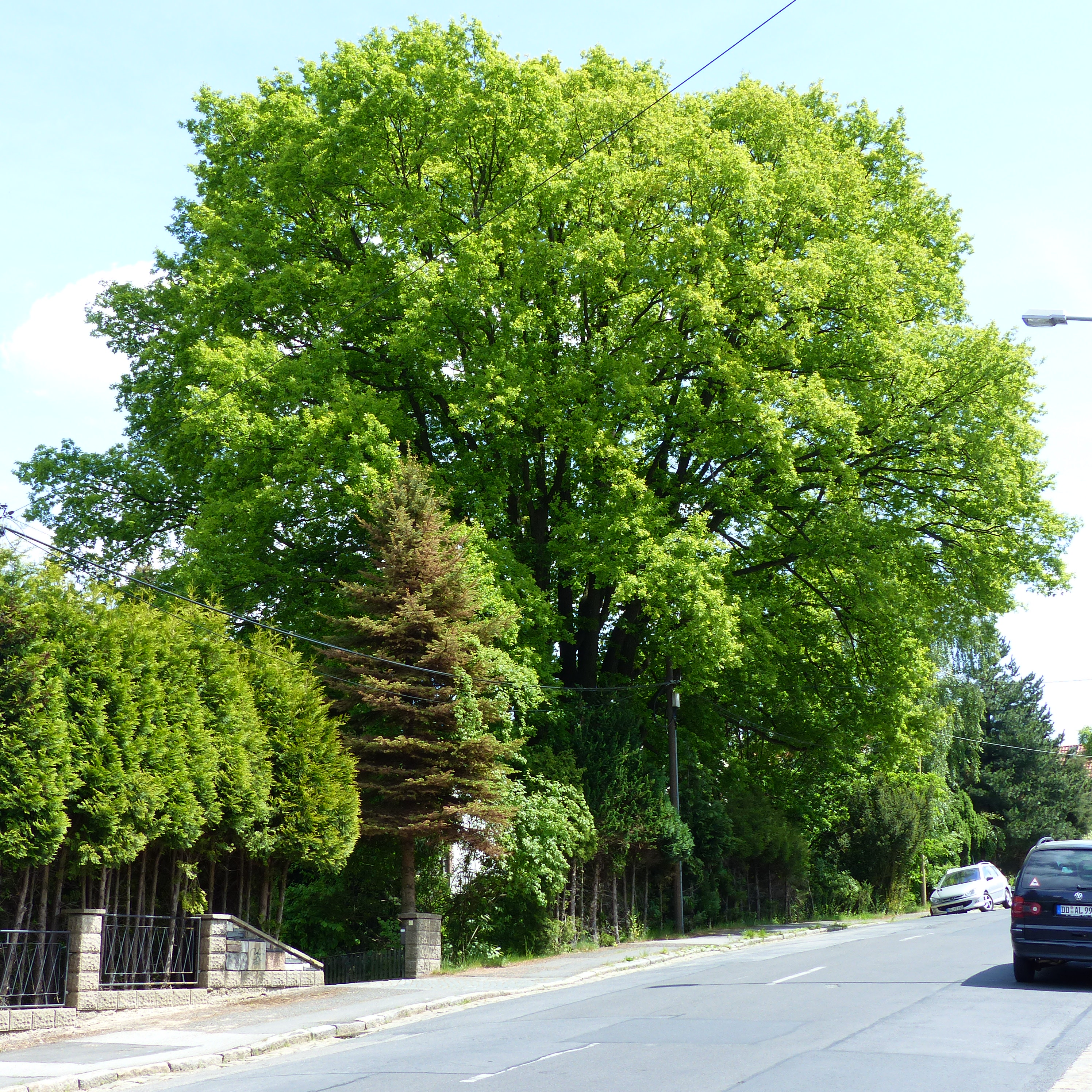 Naturdenkmal Stieleiche Quohrener Straße Bühlau